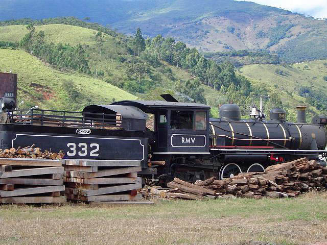 Trem de passeio turístico pela Serra da Mantiqueira (steam locomotive), Passa Quatro, Brazil.